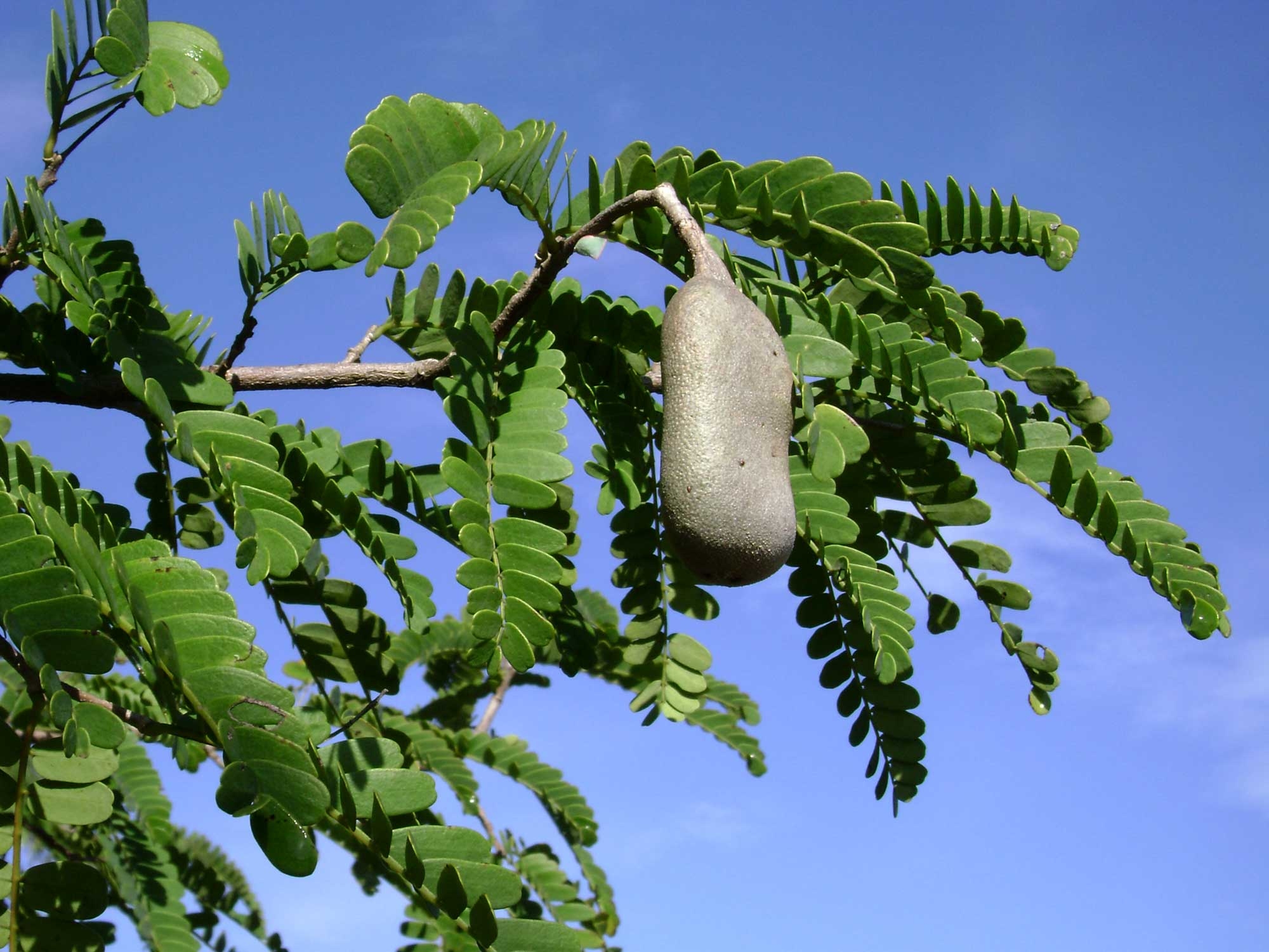 Tamarindus indica